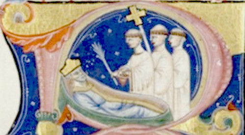 Mort de Baudouin II